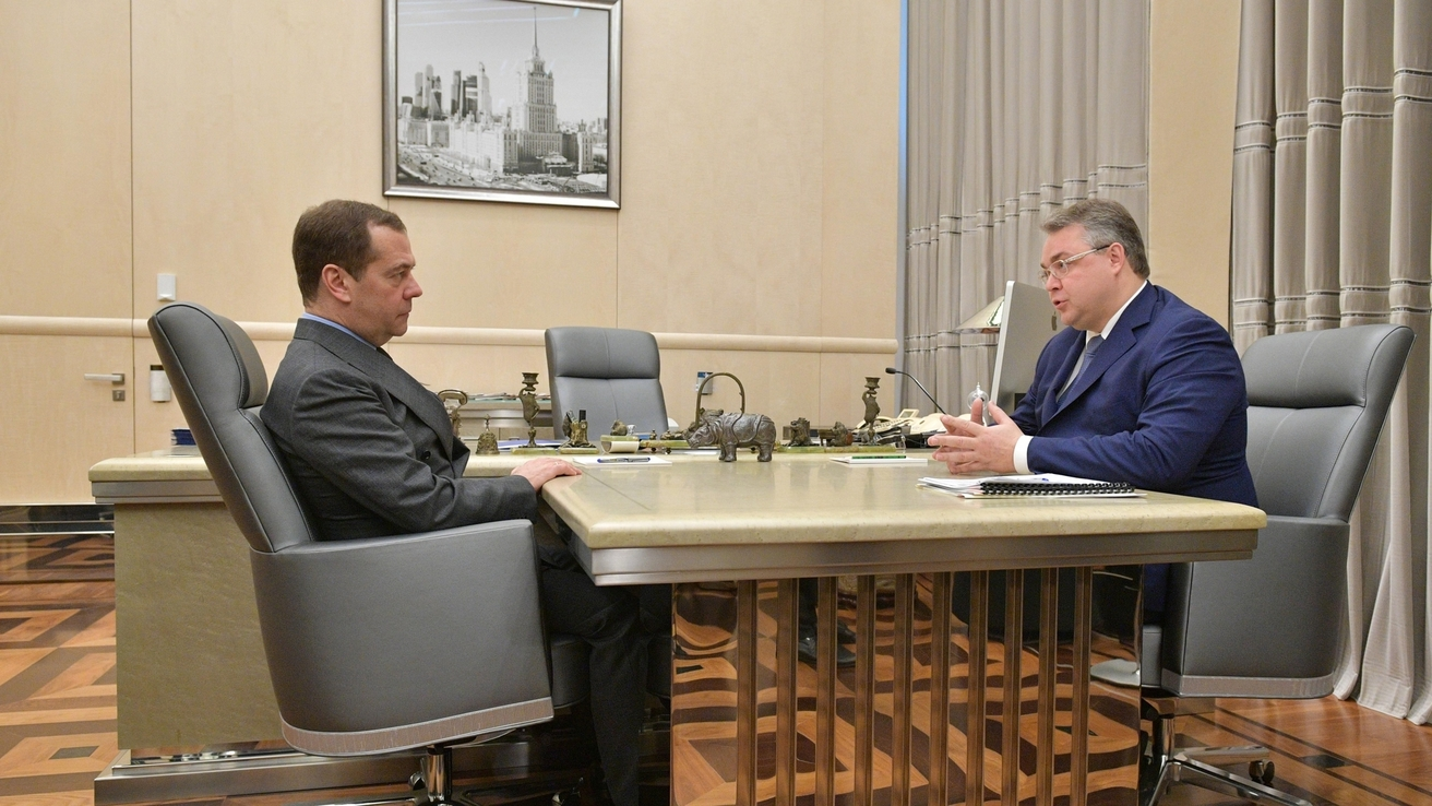 Встреча губернатора Ставропольского края Владимира Владимирова с Дмитрием Медведевым